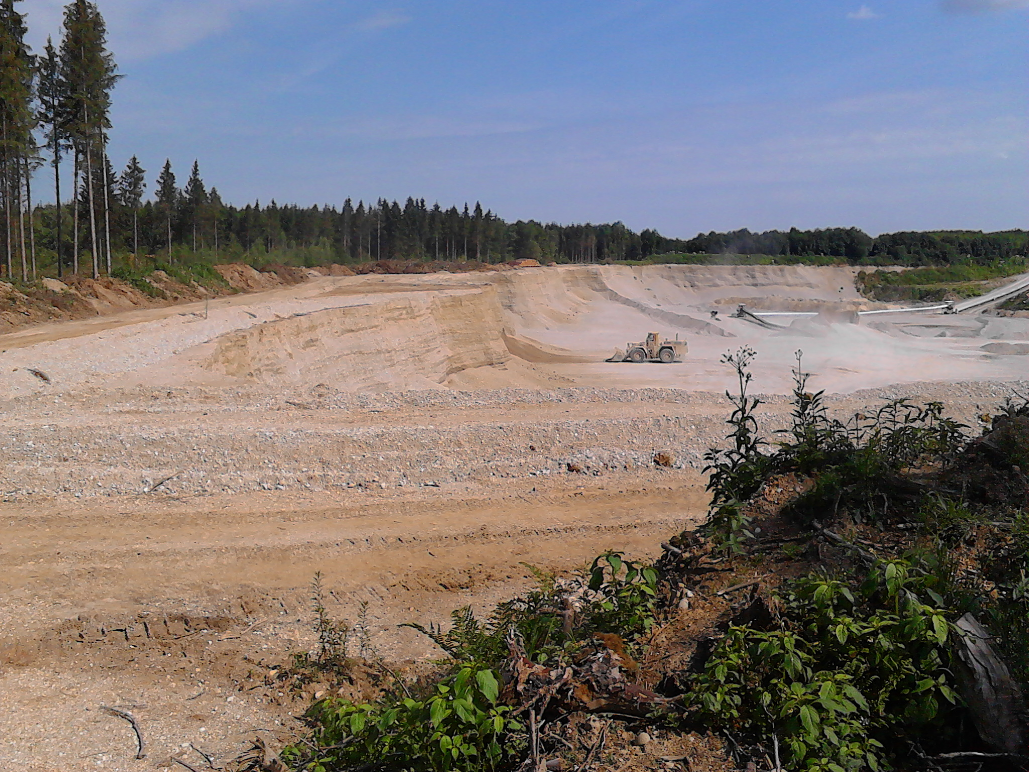 Kiesgrube bei Planegg zwischen Fürstenrieder Straße und Forst Kasten.